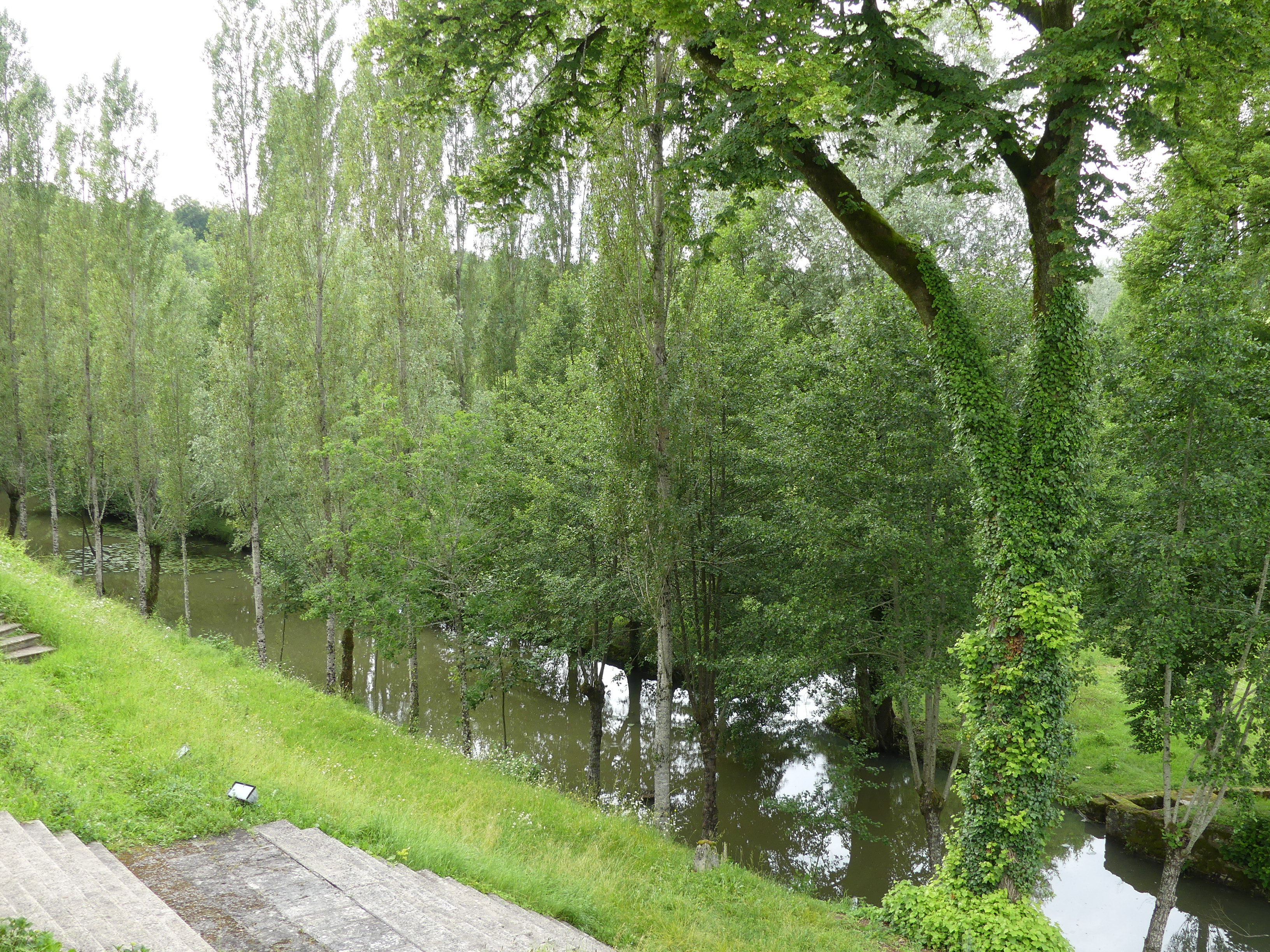 Le ruisseau de Mesplier en contrebas du château, Château-l'Évêque, Dordogne, France. Vue prise en direction de l'amont.